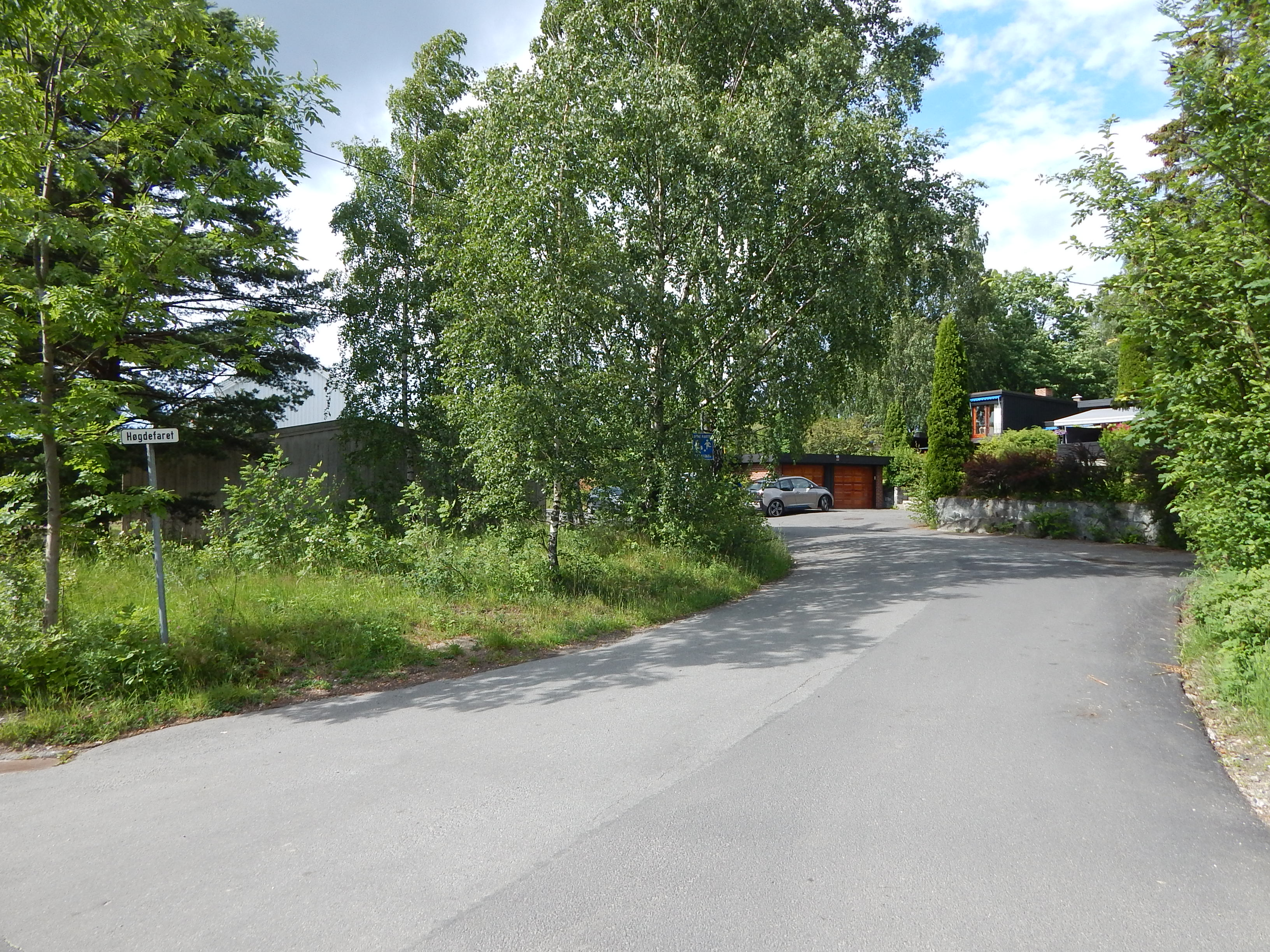 Høgdefaret